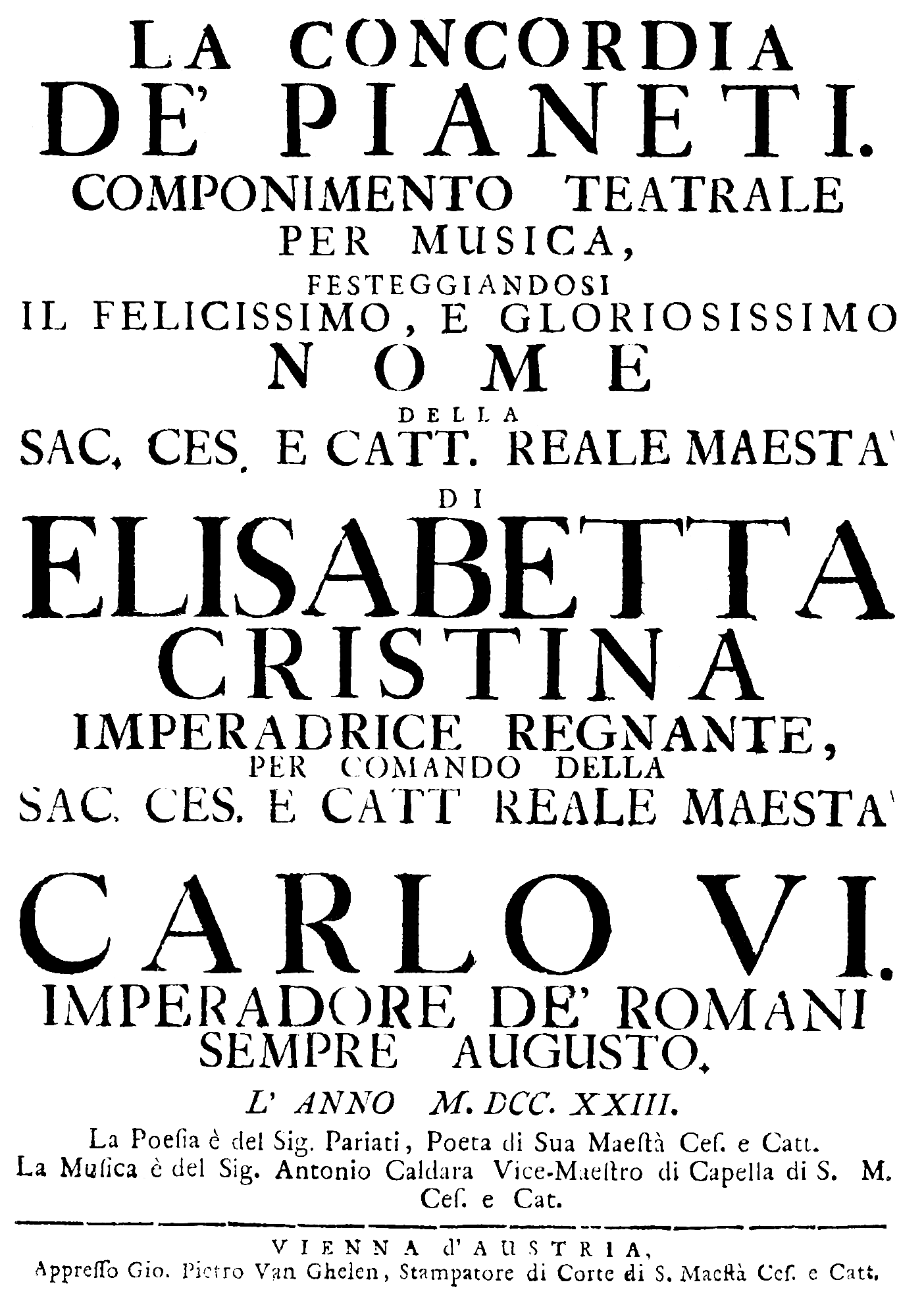 Antonio Caldara - La concordia de' pianeti - title page of the libretto - Vienna 1723